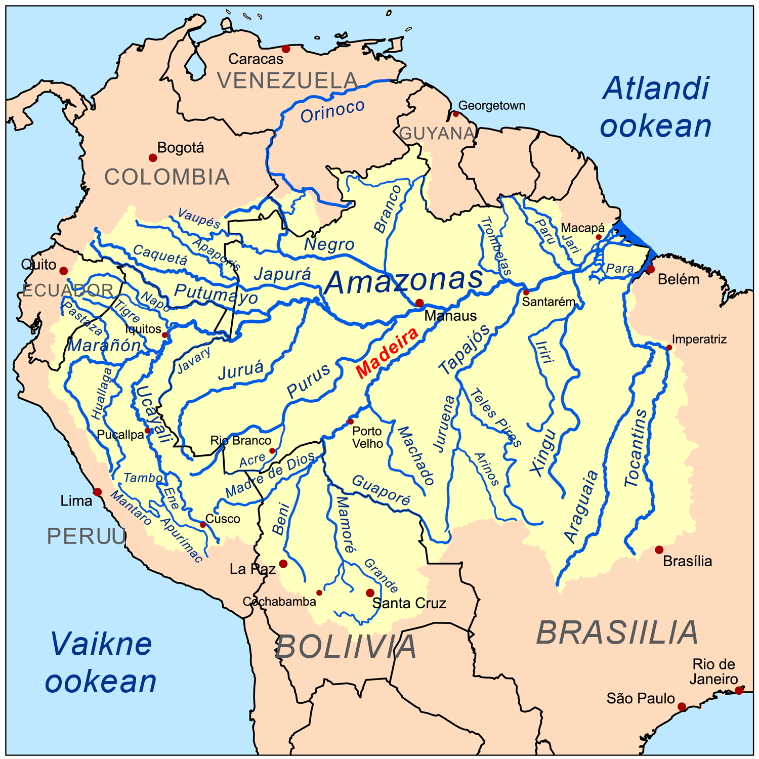 Madeira jõgi